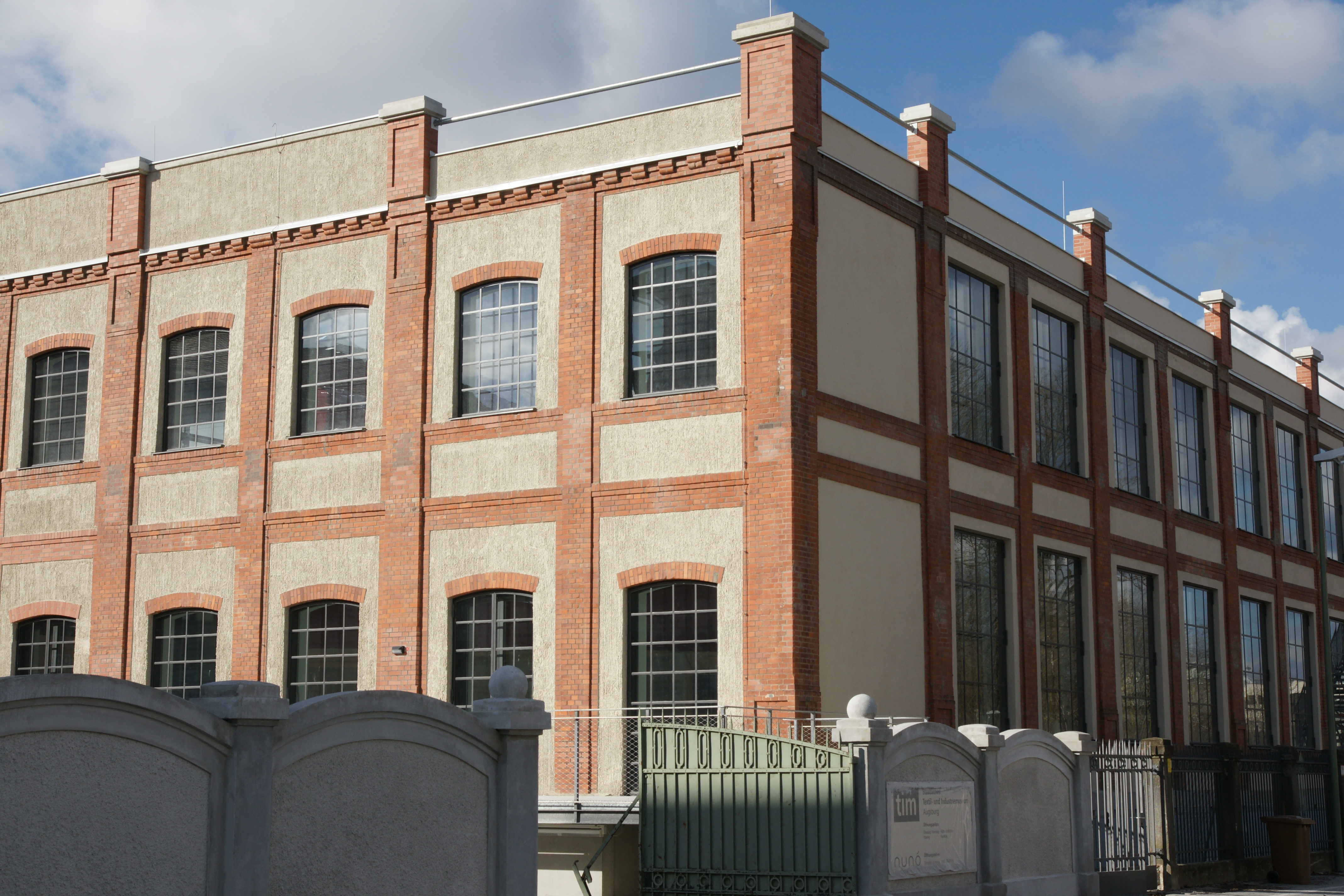 Textil- und Industriemuseum (tim) in Augsburg